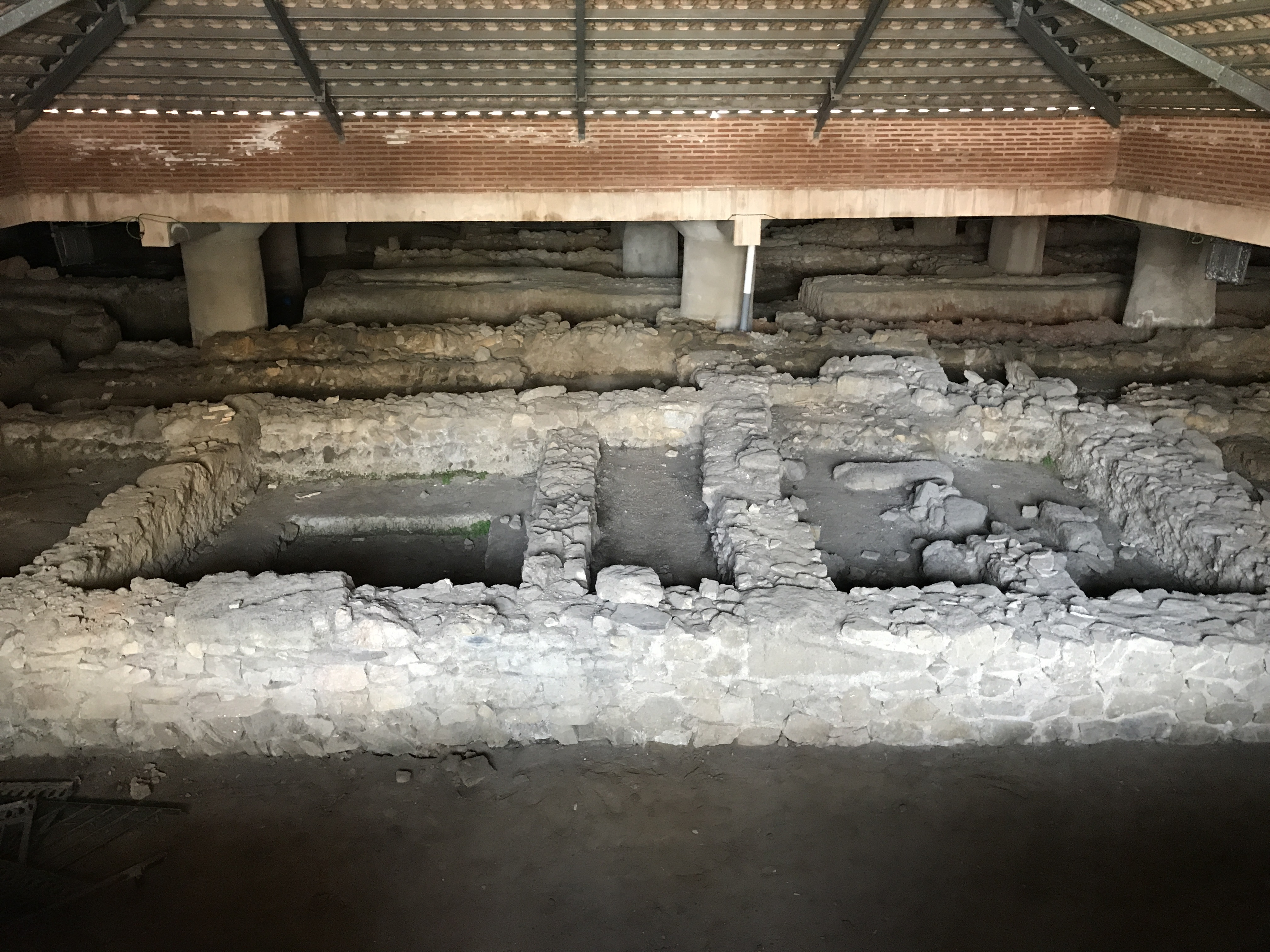 Benalroma (vista desde el oeste)